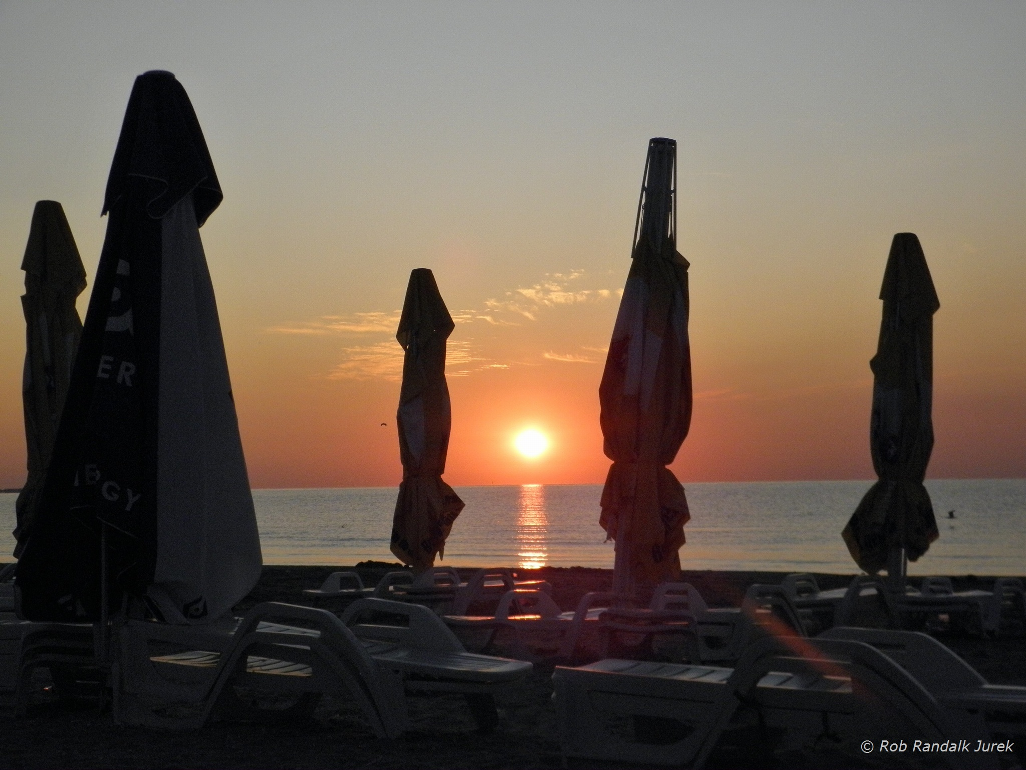 Mamaia